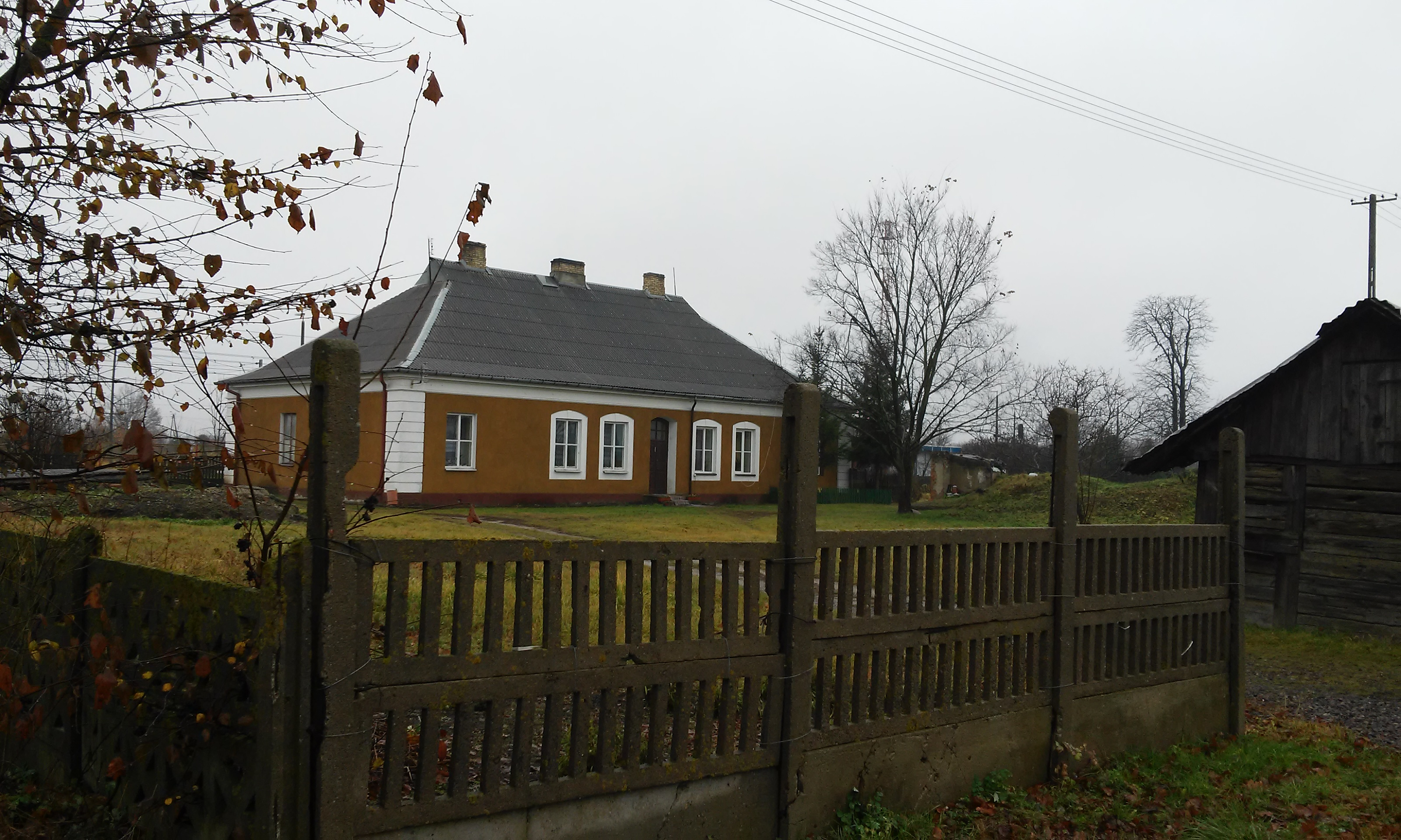 Zabytkowy dom dróżnika przy stacji kolejowej w Chotyłowie